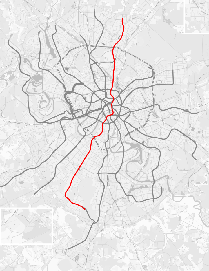 Калужско-Рижская линия Московского метрополитена